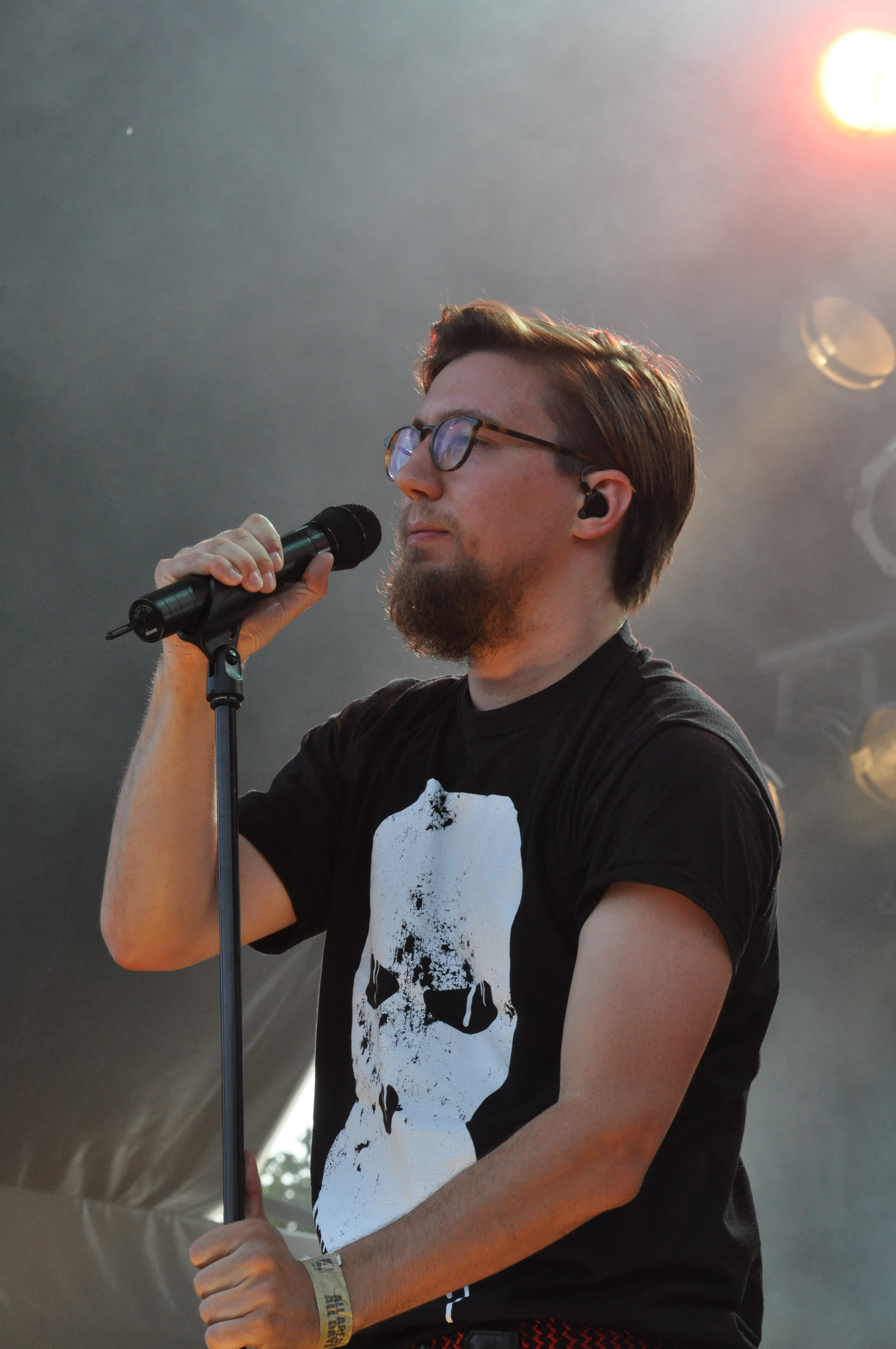 Prinz Pi auf dem Spack!-Festival 2013